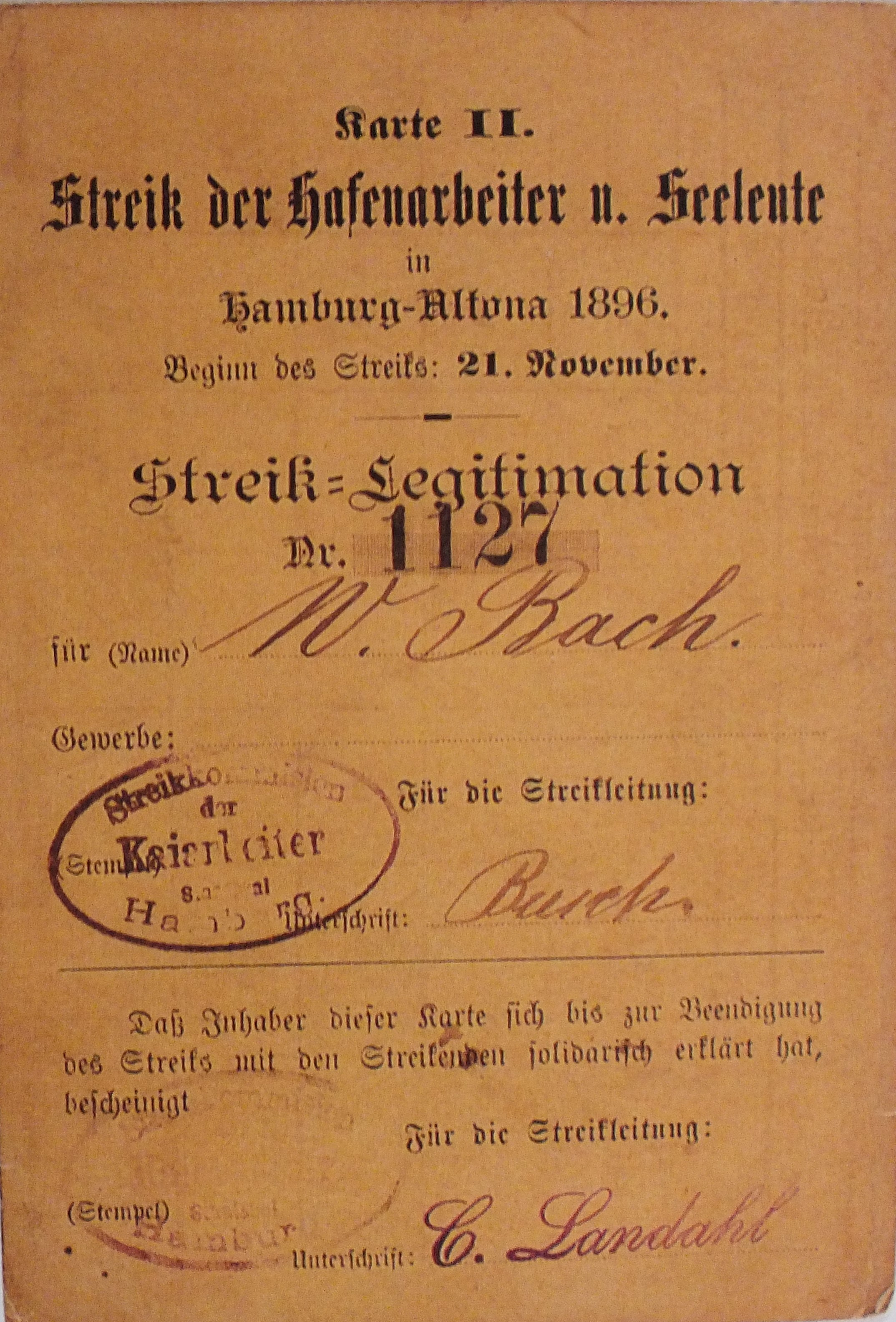 Streikkarte 1896 vom Hafenarbeiterstreik.